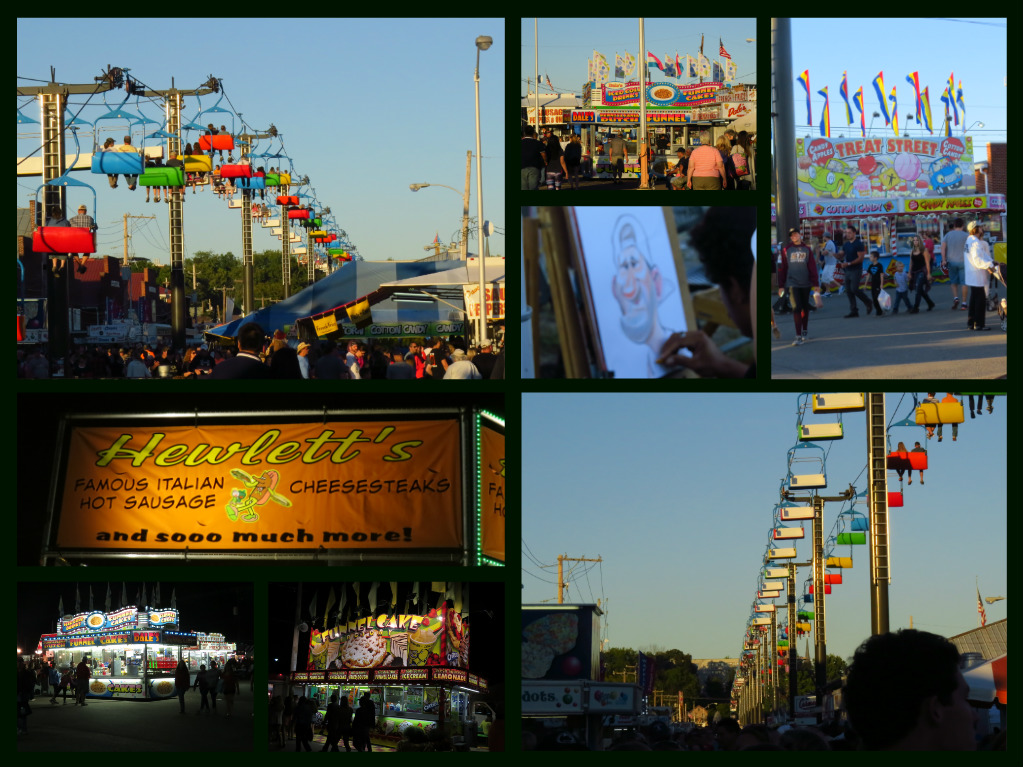 Bloomsburg Fair 2016